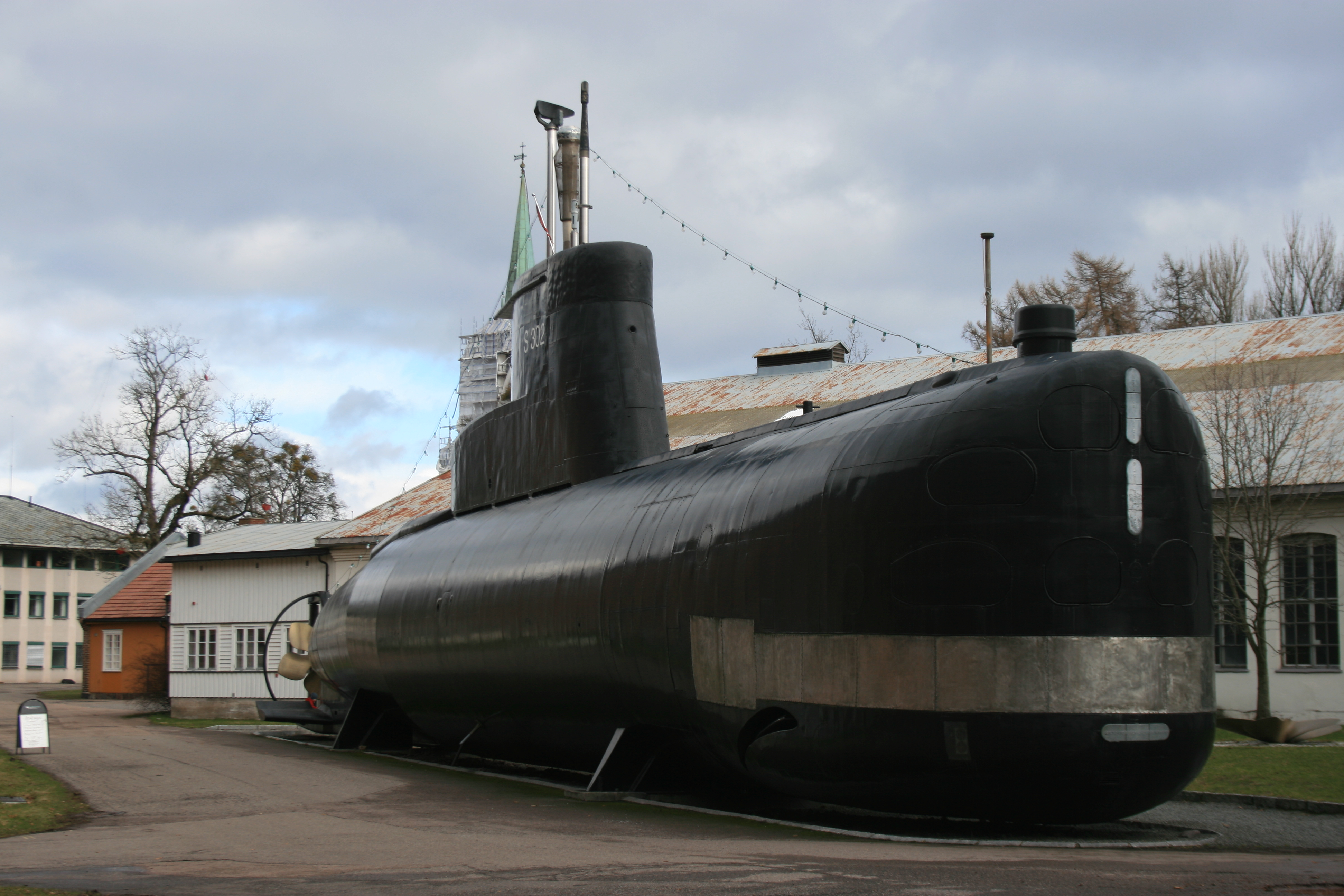 KNM Utstein. Ofte kalt fisk på land.